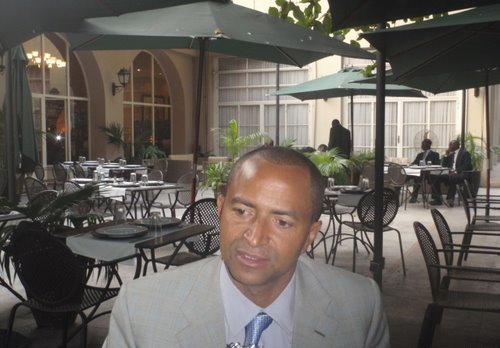 Moise Katumbi